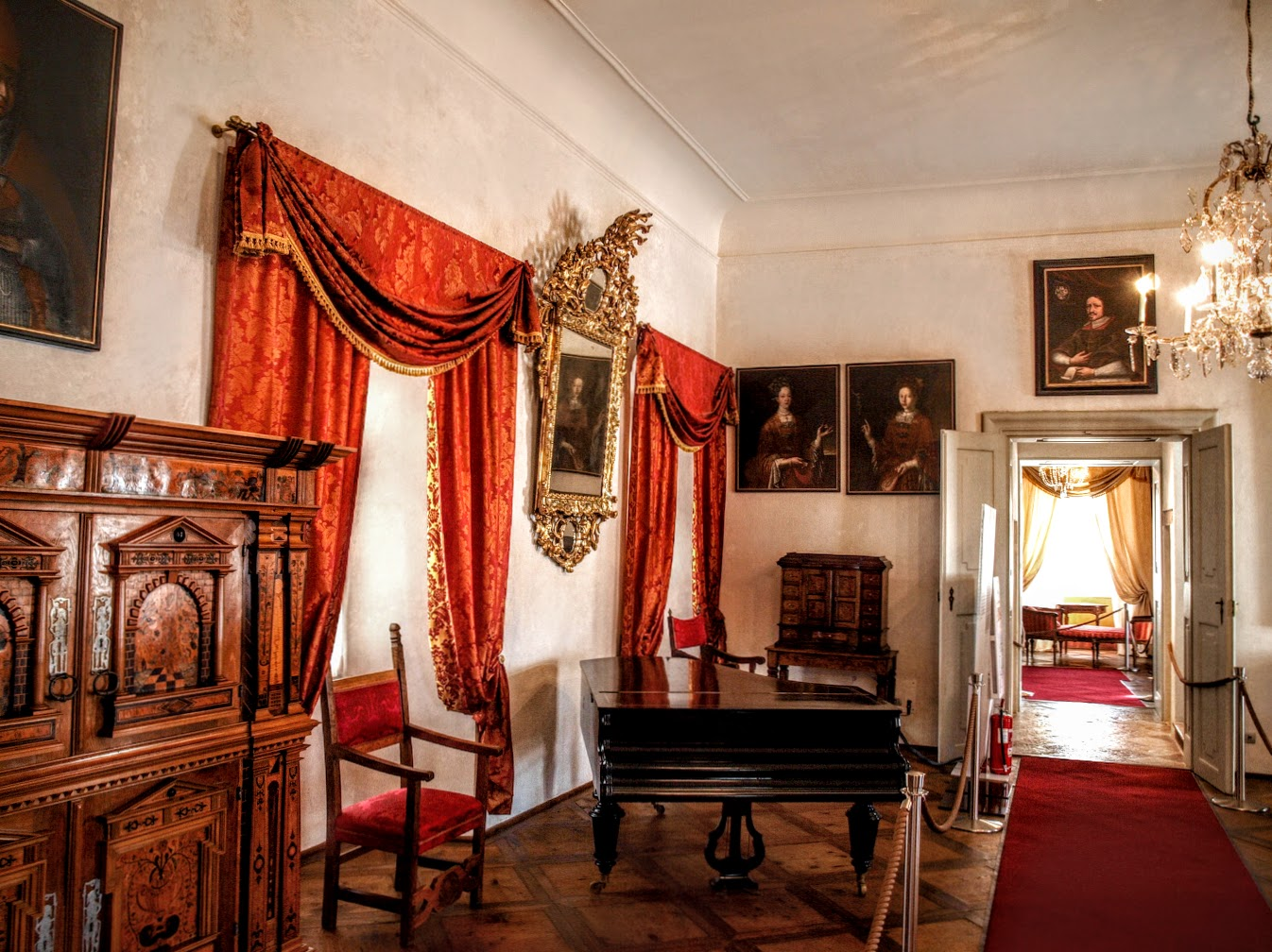 Hrad Thun